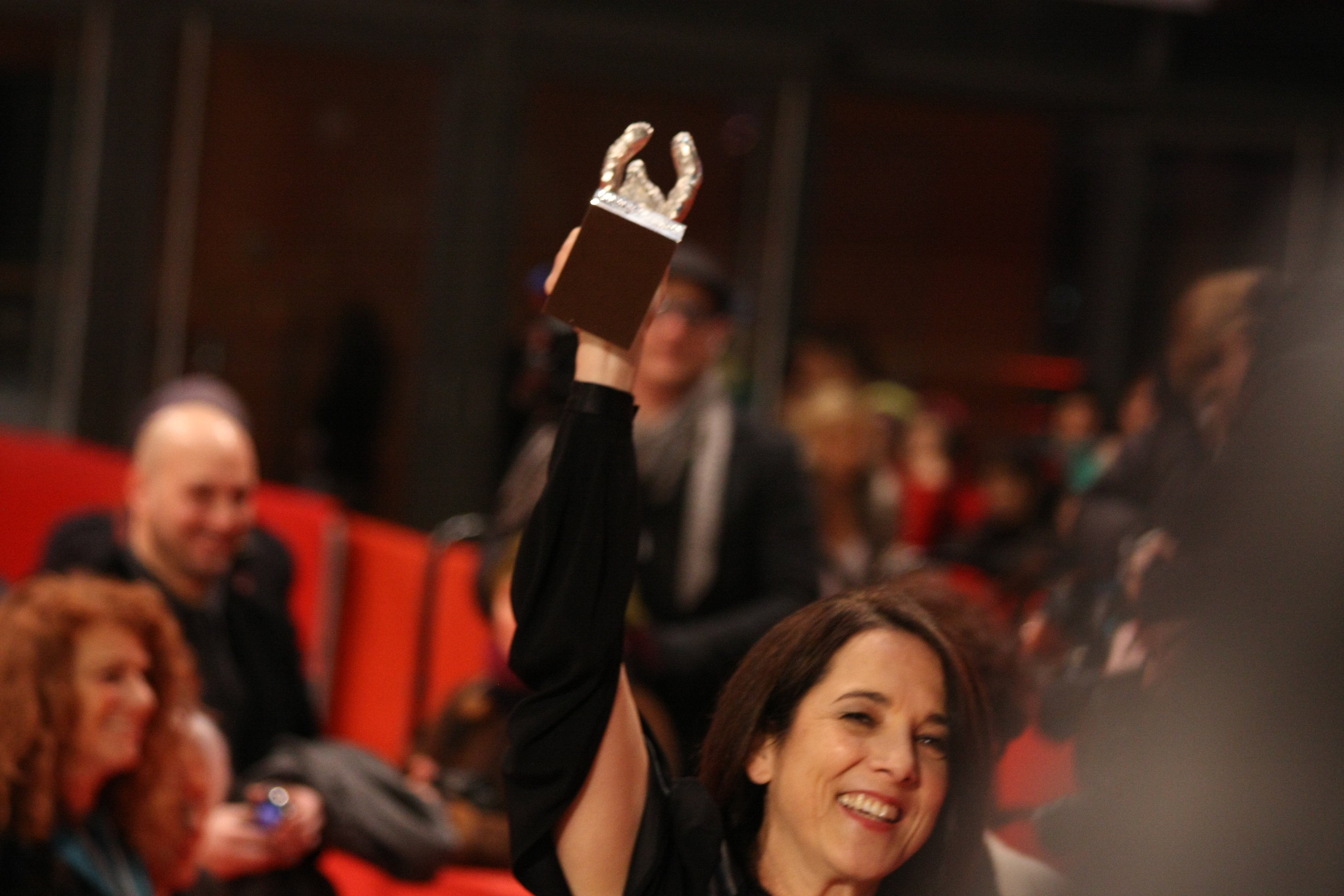 Berlinale 2013 . 63. Internationale Berliner Filmfestspiele - Photo: Alireza Rezvani Pictures . Web . Multimedia